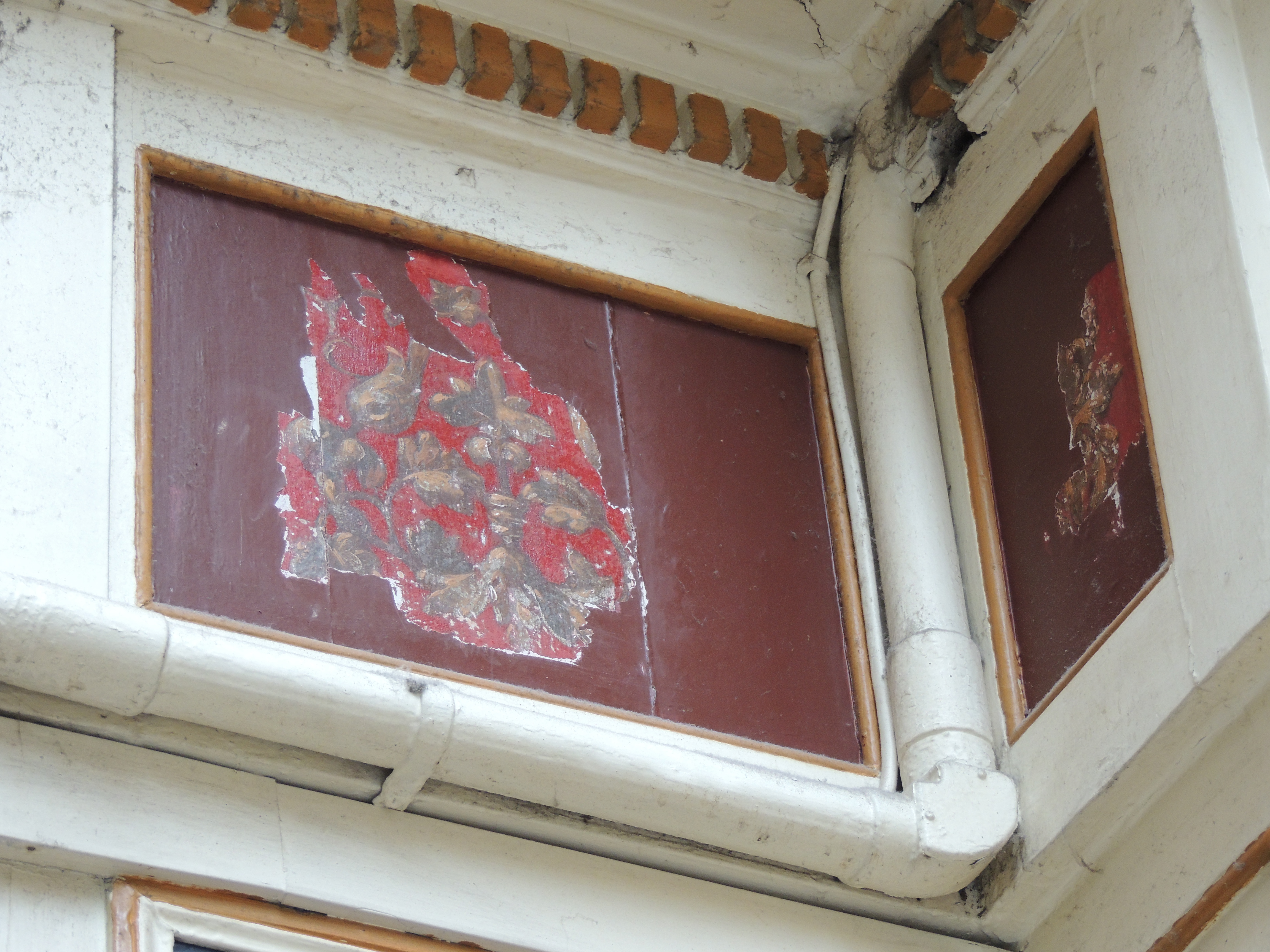 Passage Pommeraye, Nantes, France. Ancienne peinture décorative mise au jour lors d'une rénovation.